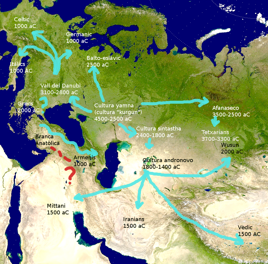 Migracions dels indoaris